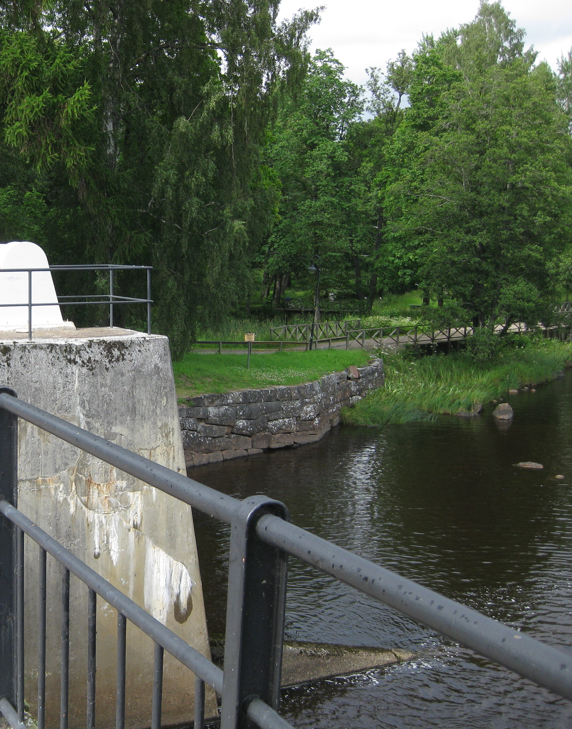 Boulognerskogen vid kraftverket i Gävle